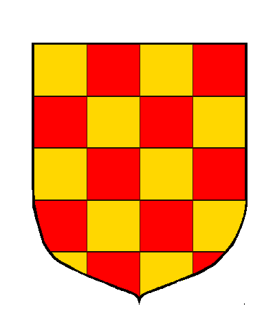 Escut dels barons d'Eroles (Fígols de Tremp, Tremp, Pallars Jussà)